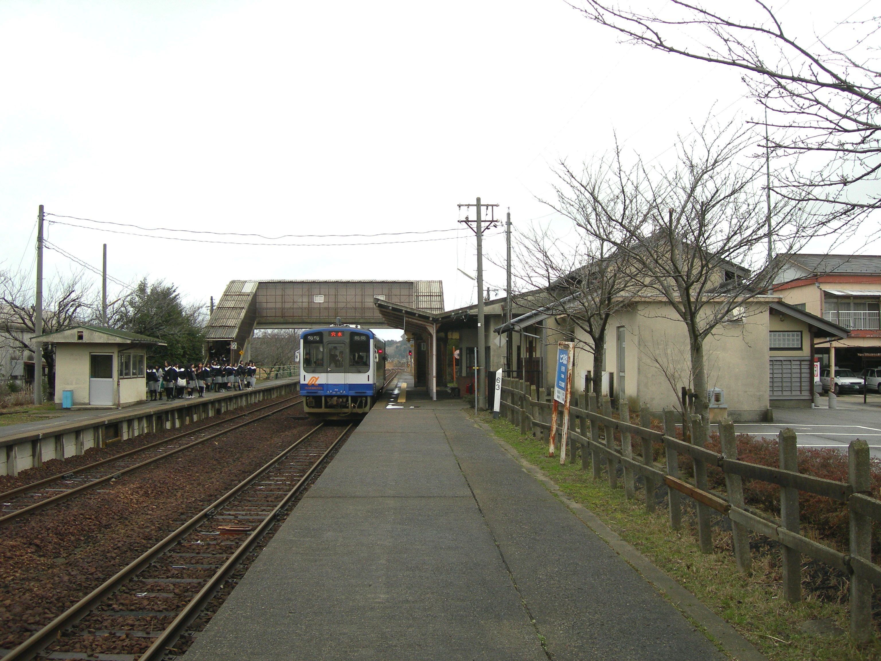 のと鉄道 田鶴浜駅ホーム